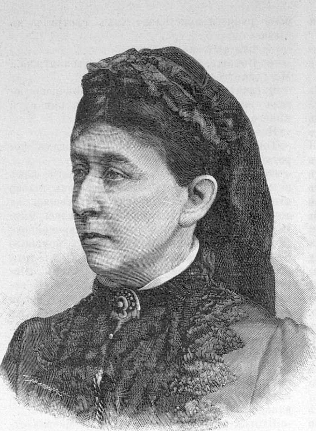 Гейден Елизавета Николаевна, графиня